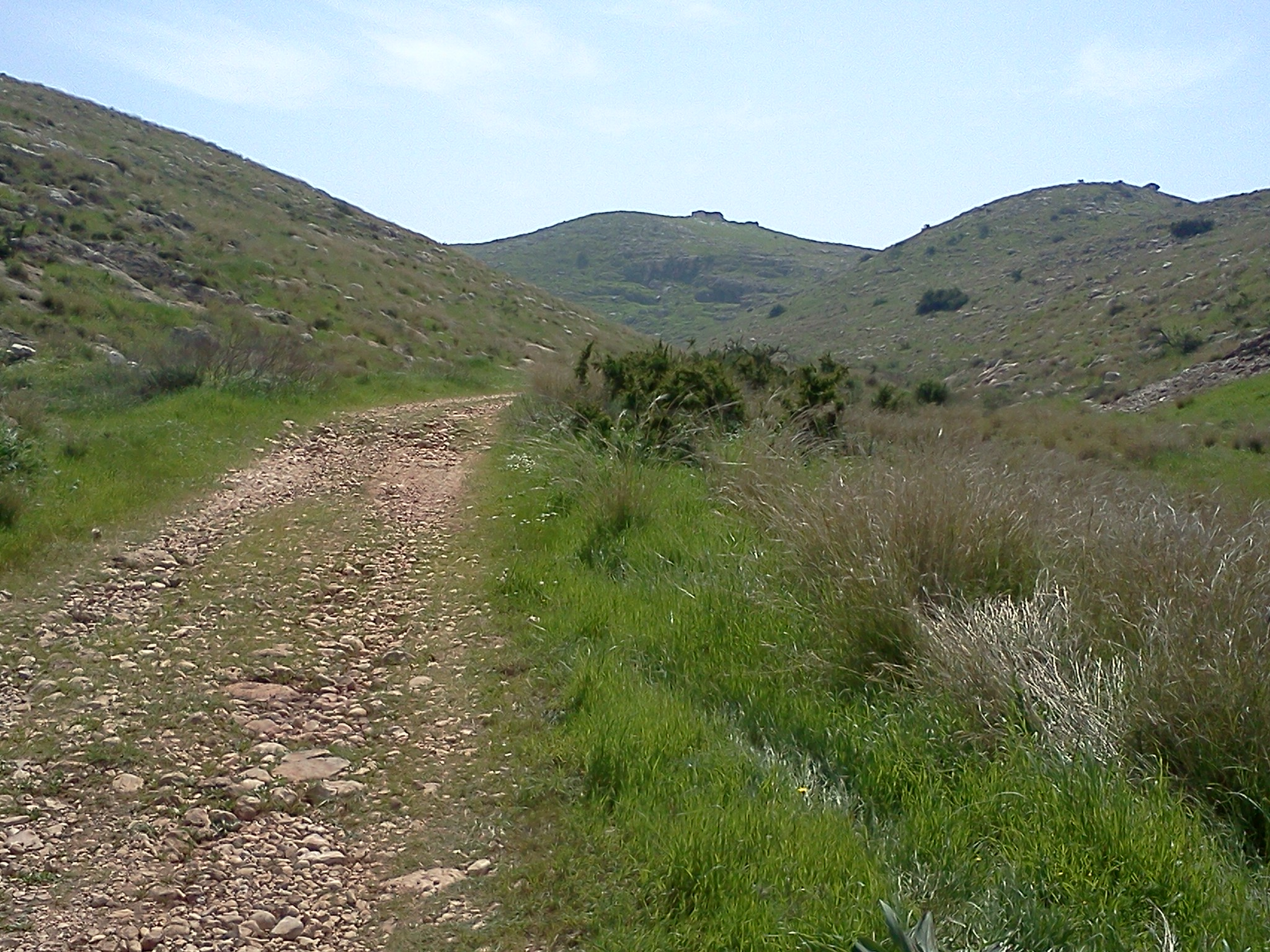 נוף הנחל בהדום השומרון